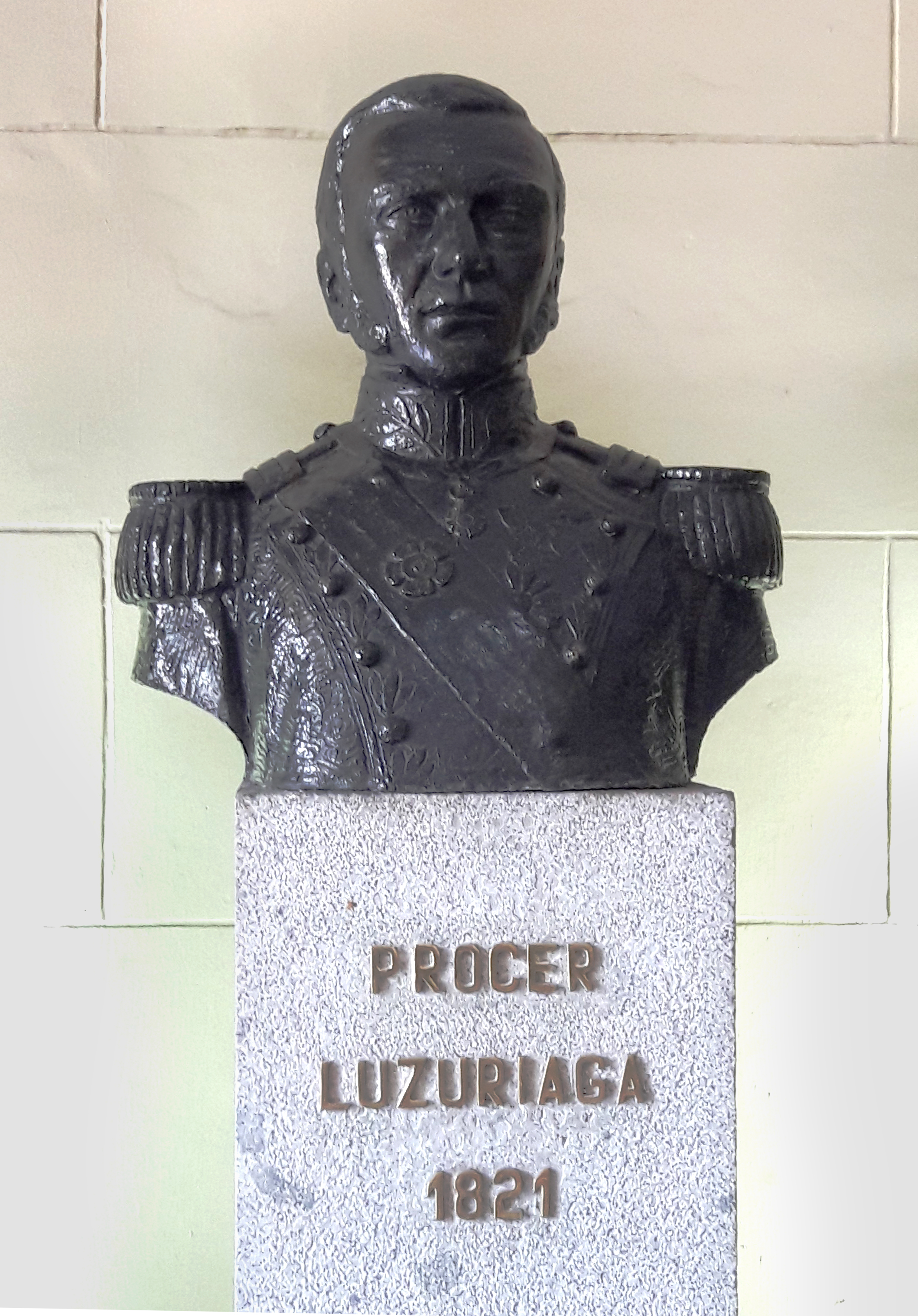 Prócer Luzuriaga 1821